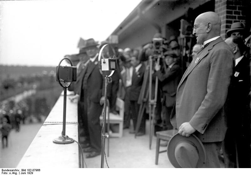 Die Eröffnung des grössten Volksparkes in Berlin! Der Goethe-Park, die ehenmaligen Rehberge in Berlin-Wedding, eine der schönsten und grössten Anlagen Berlins, wurde unter Anwesenheit von über 20000 Kindern und zehntausenden von Zuschauern feierlichst eröffnet. Oberbürgermeister Boess eröffnet in einer Ansprache den grössten Volkspark Berlins.